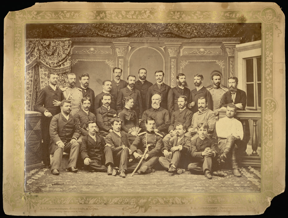 Преподаватели и възпитаници на Робърт колеж